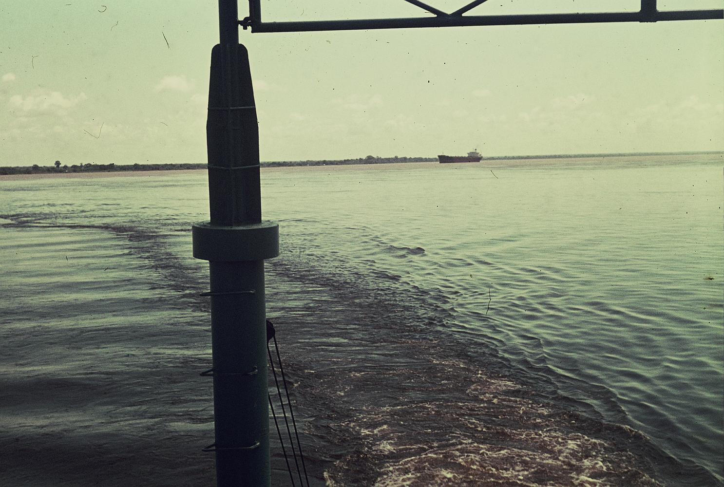 La distinta coloración de las aguas del Caroní (aguas oscuras que proceden de la Guayana venezolana), en primer lugar, de las del Orinoco, al fondo.